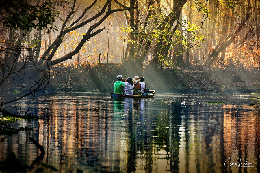 Rio Caraparu na Vila de Caraparu